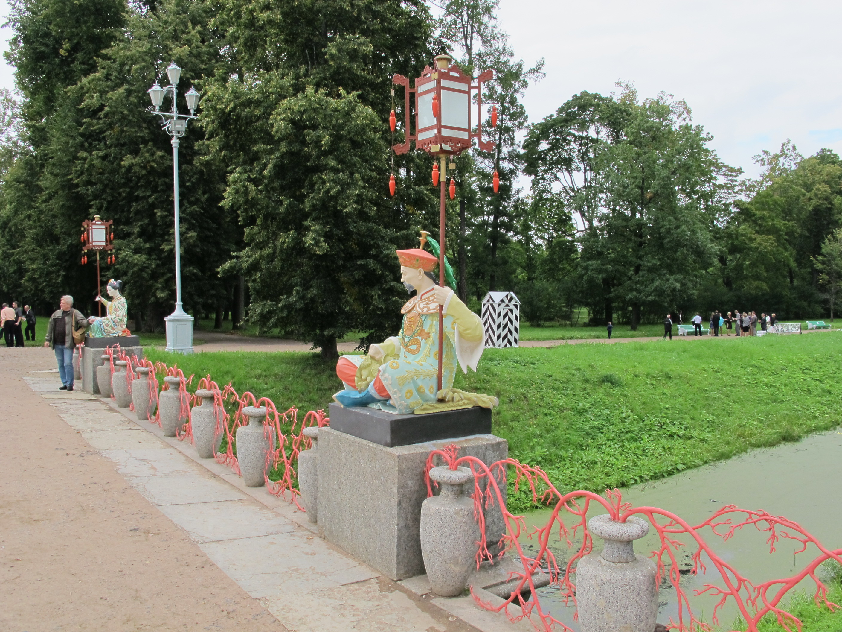 Parco di alessandro, ponte cinese